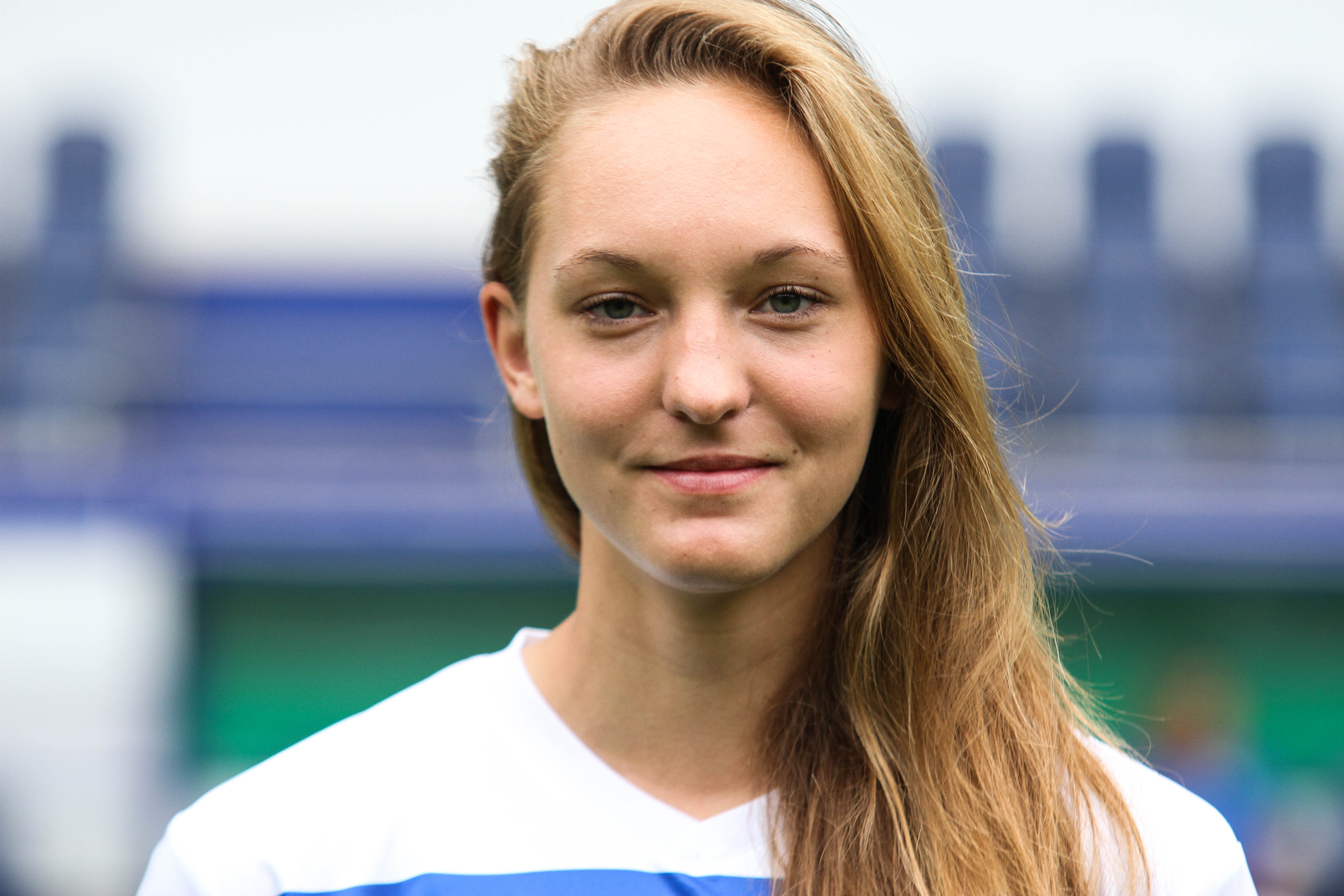 Sarah Schmitz (2014)